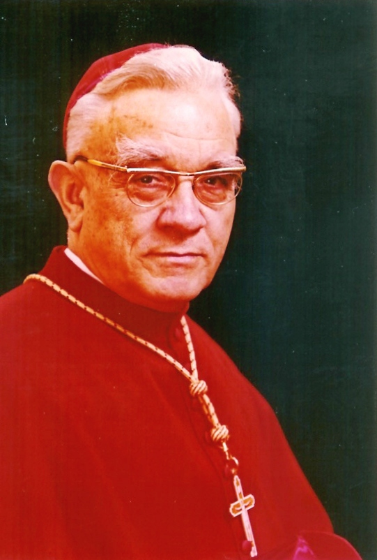 Kardinol László Lékai.